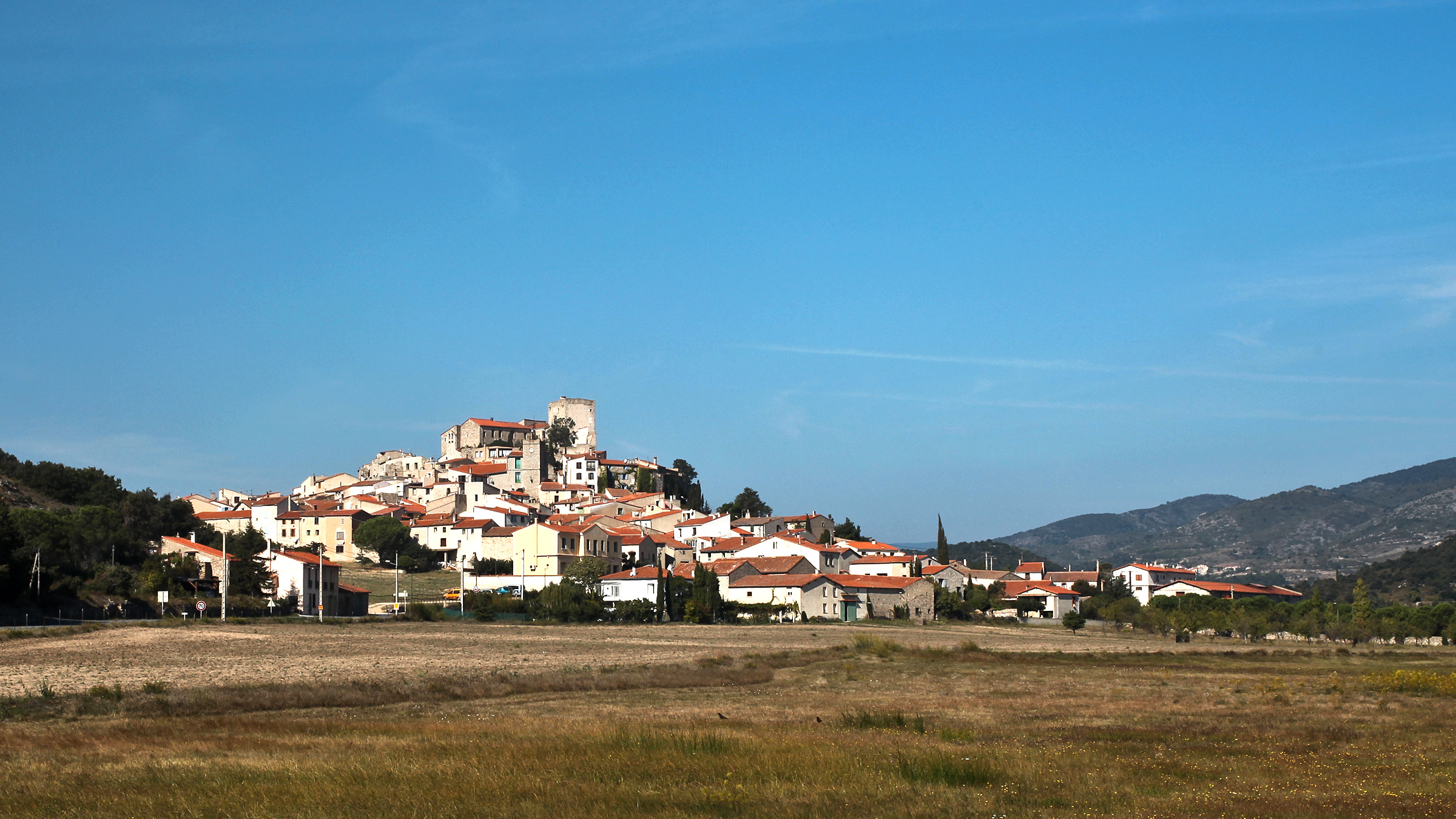 Village de Montalba-le-Château, Pyrénées-Orientales